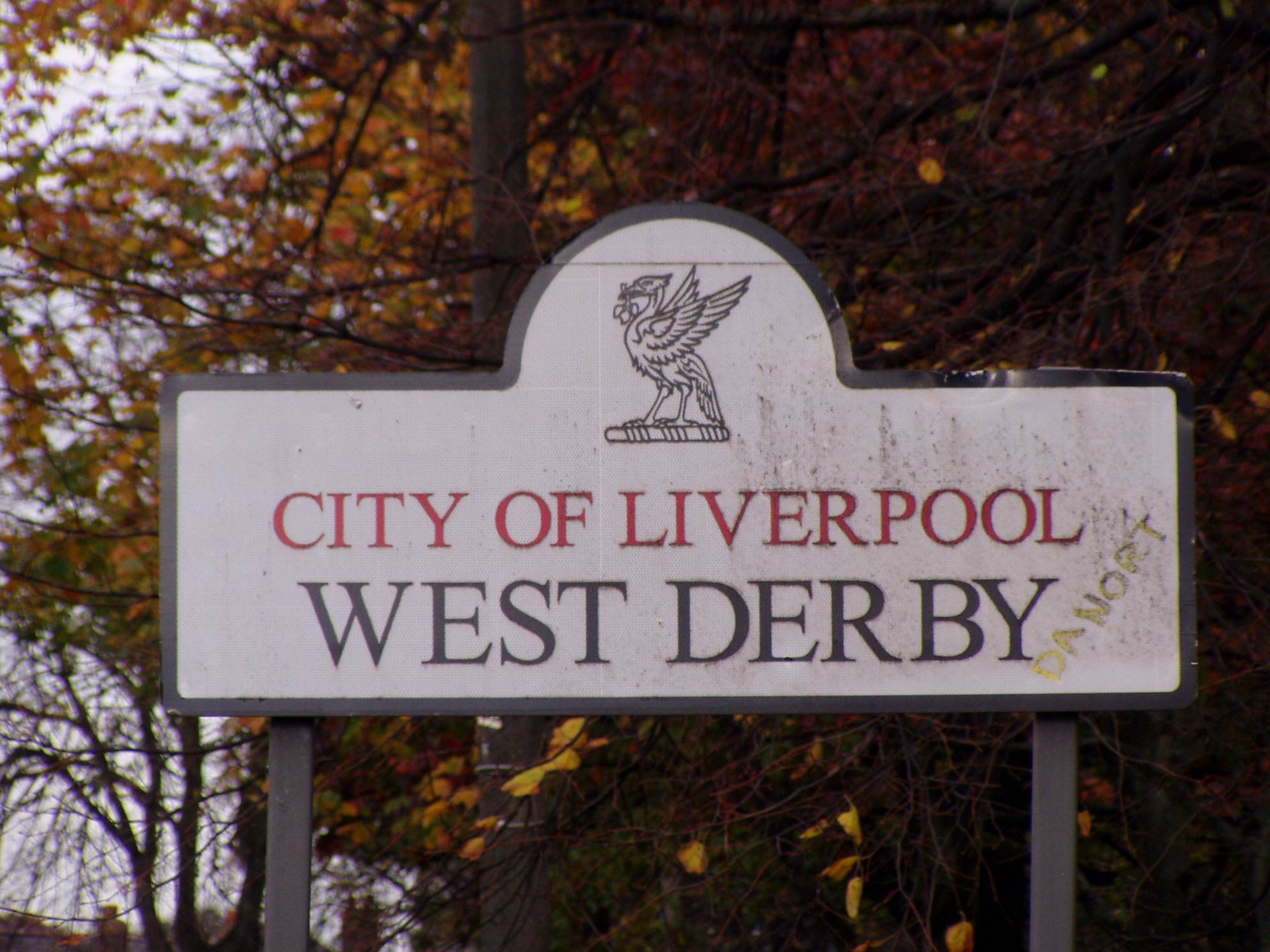 West Derby Cemetery